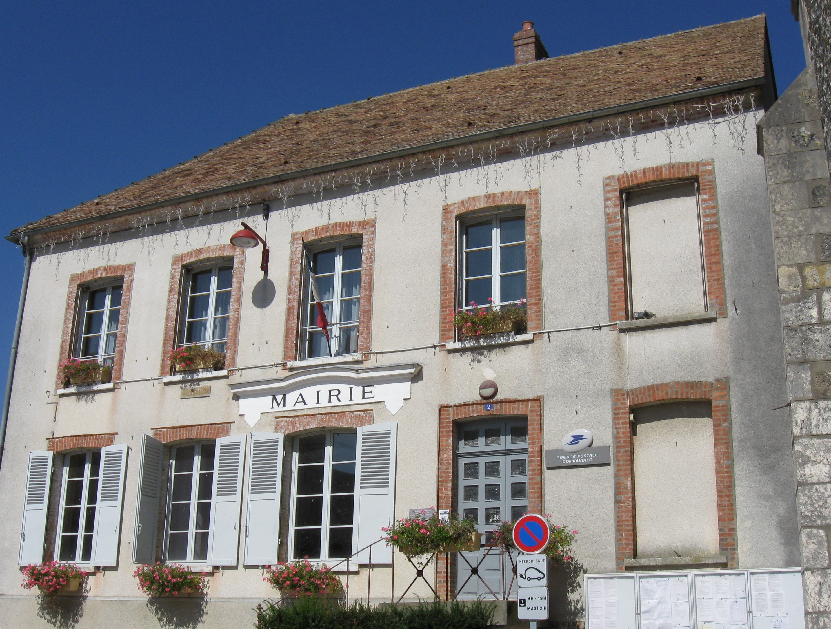 Mairie de Montigny-Lencoup. (Seine-et-Marne, région Île-de-France).